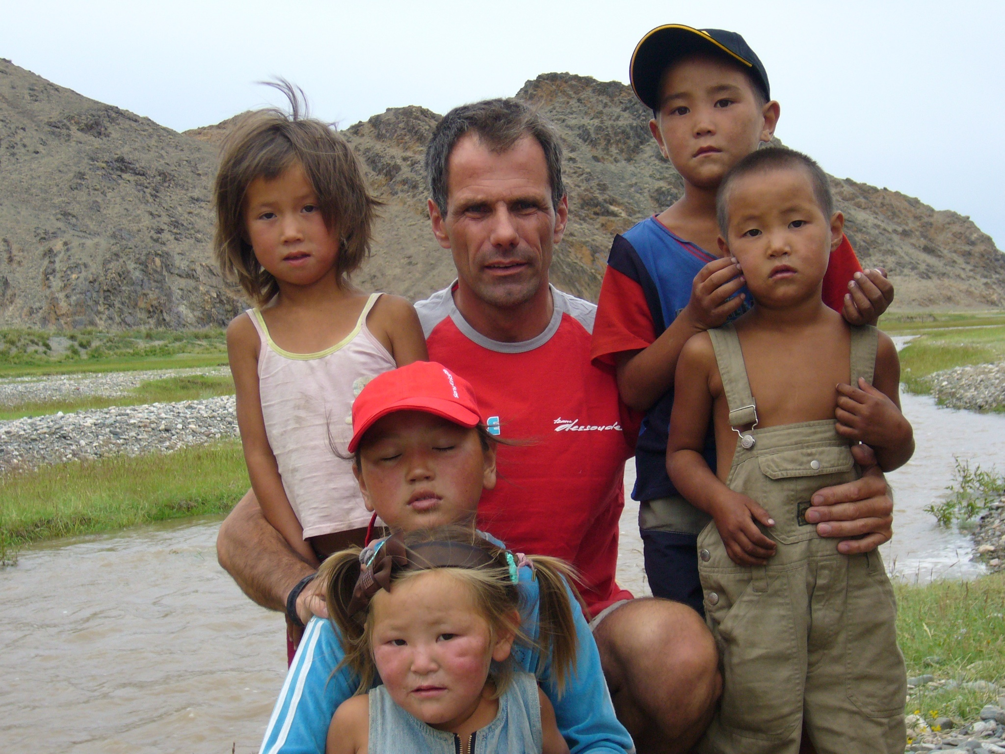 Transsiberya